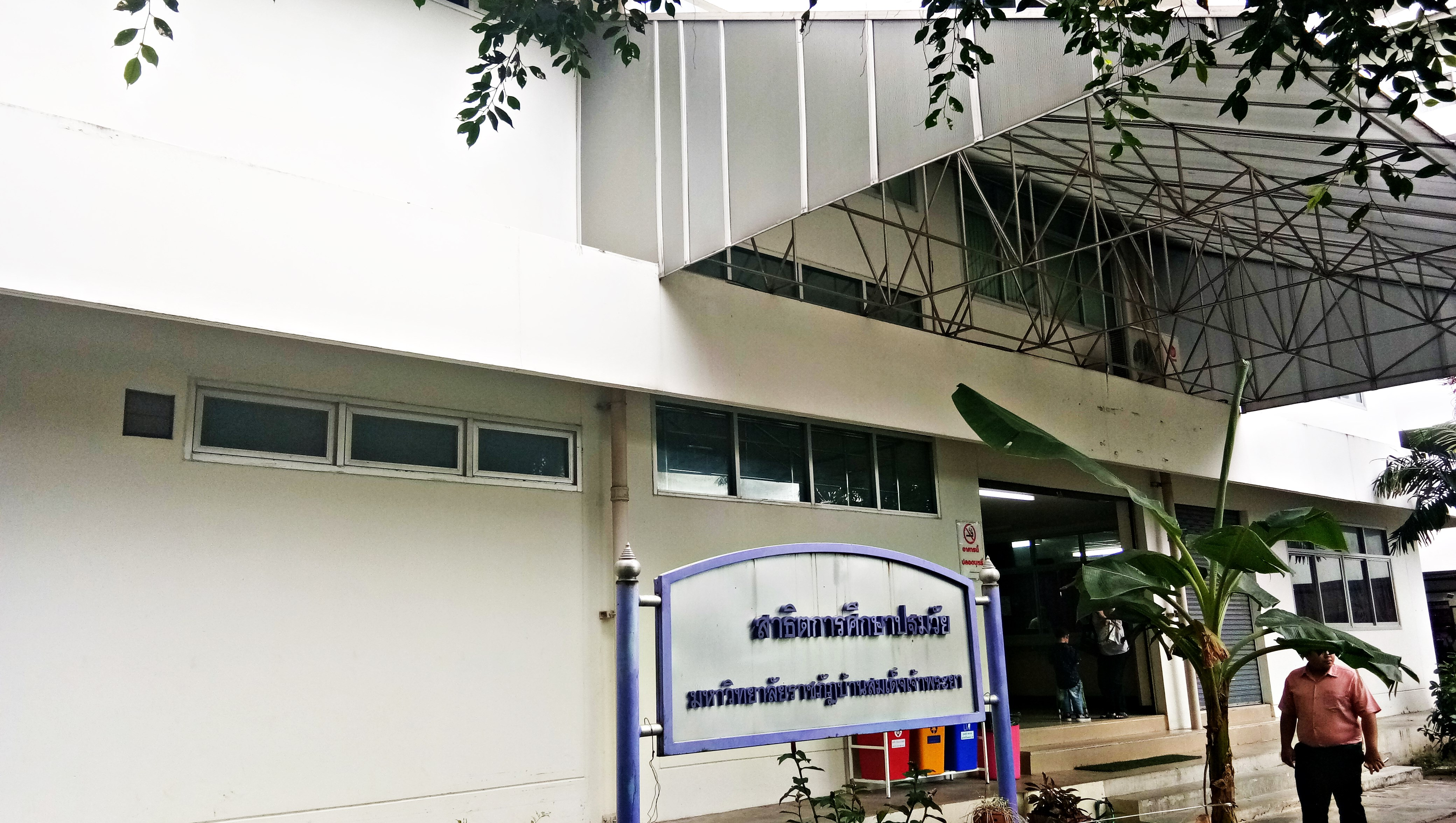 สาธิตปฐมวัย บ้านสมเด็จฯ